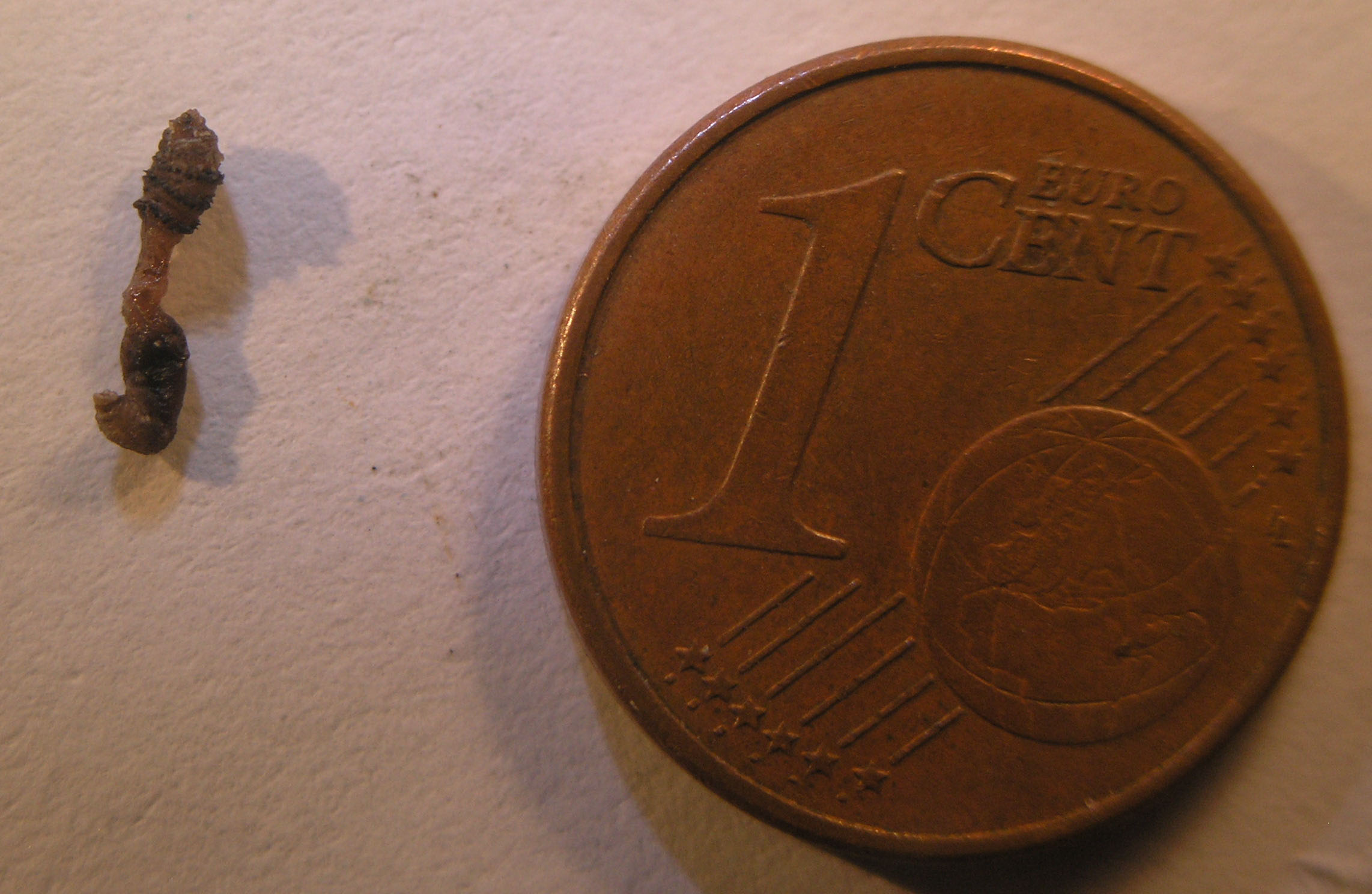 Larve von Dermatobia hominis nach dem Schlüpfen